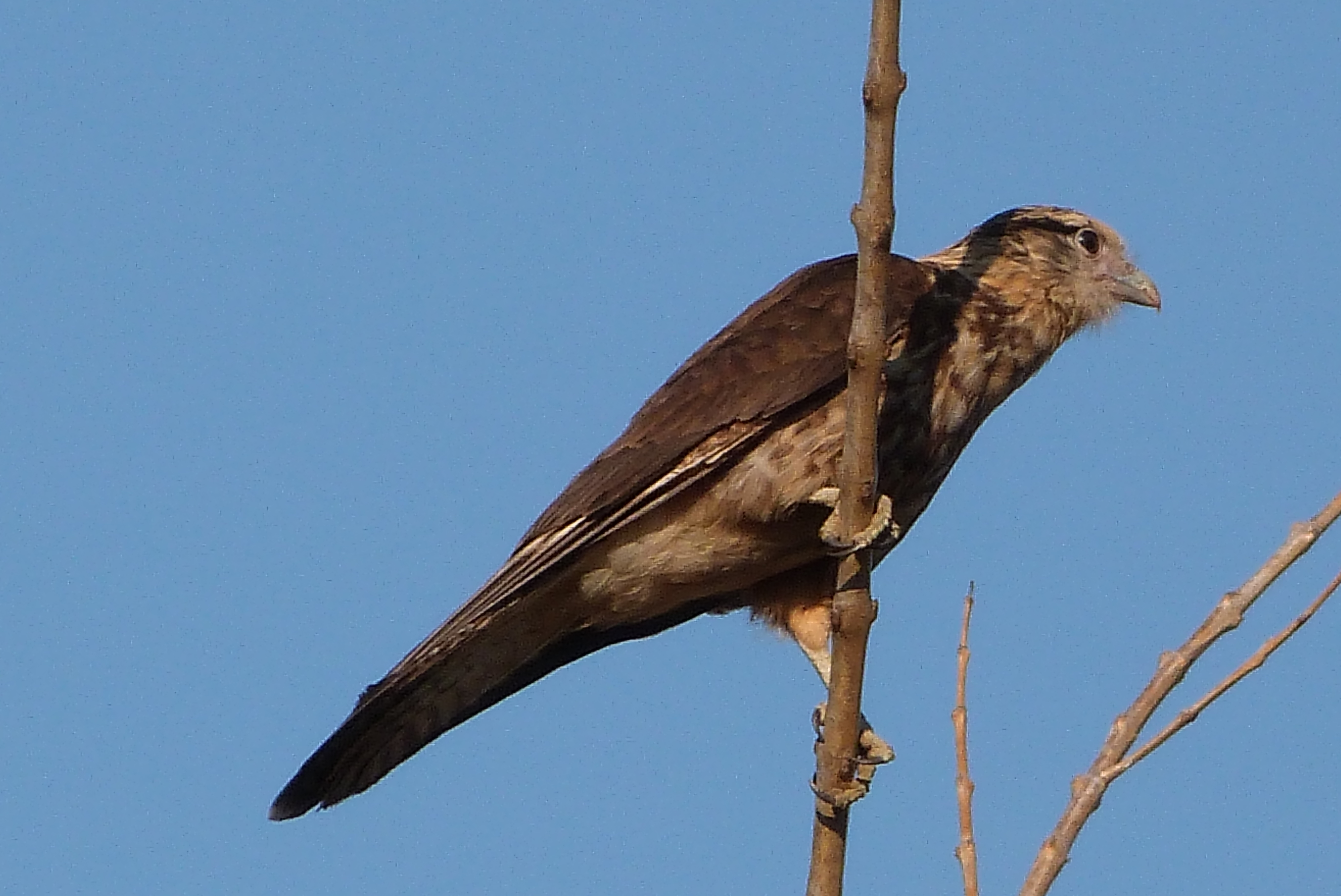 Foto tirada em Entre Rios - MG